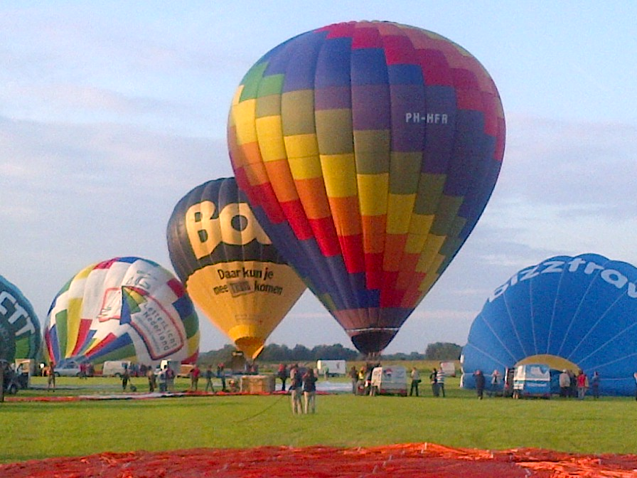 Ballon Fiësta Meerstad 2012